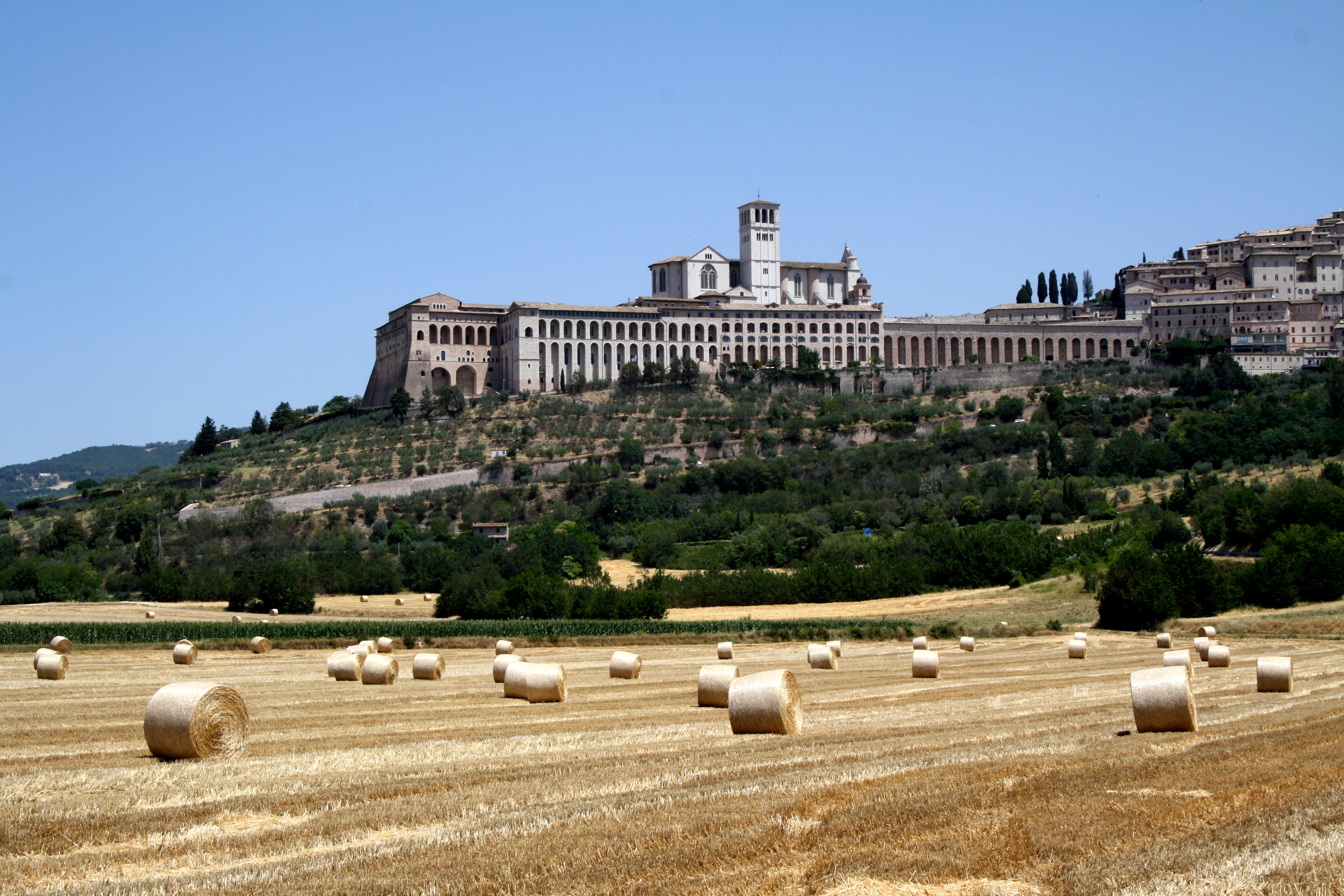 Veduta della Basilica di San Francesco ad Assisi nel 2012, ripresa da un campo di grano prima che questo bruciasse qualche ora dopo.